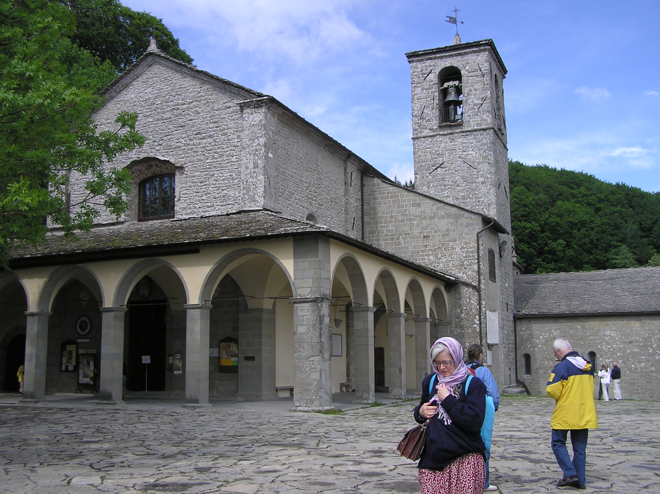 La Verna